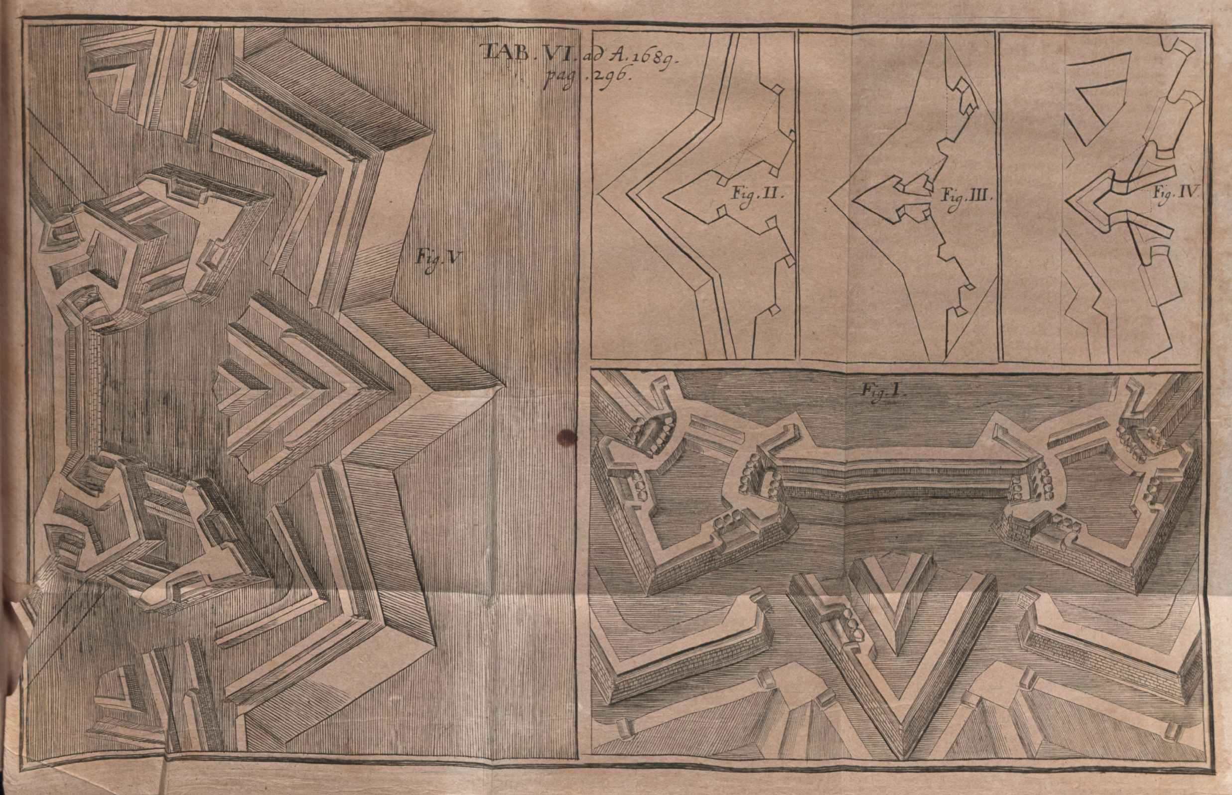 Illustration